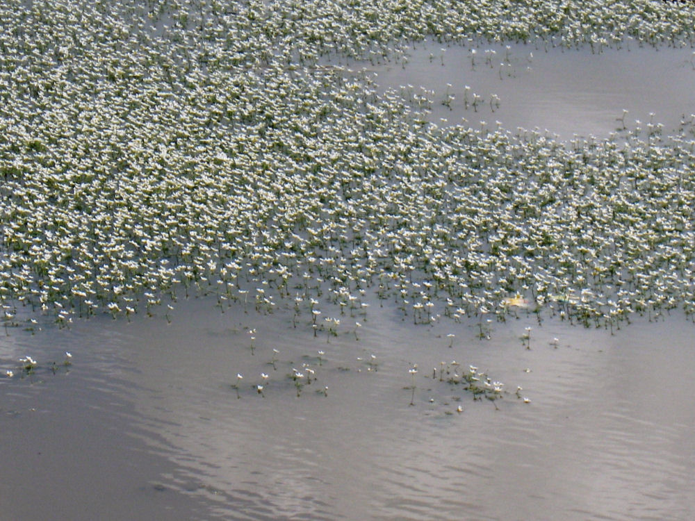 Damason3.JPG רישיון נוצר על ידי משתמש:Daniel Ventura